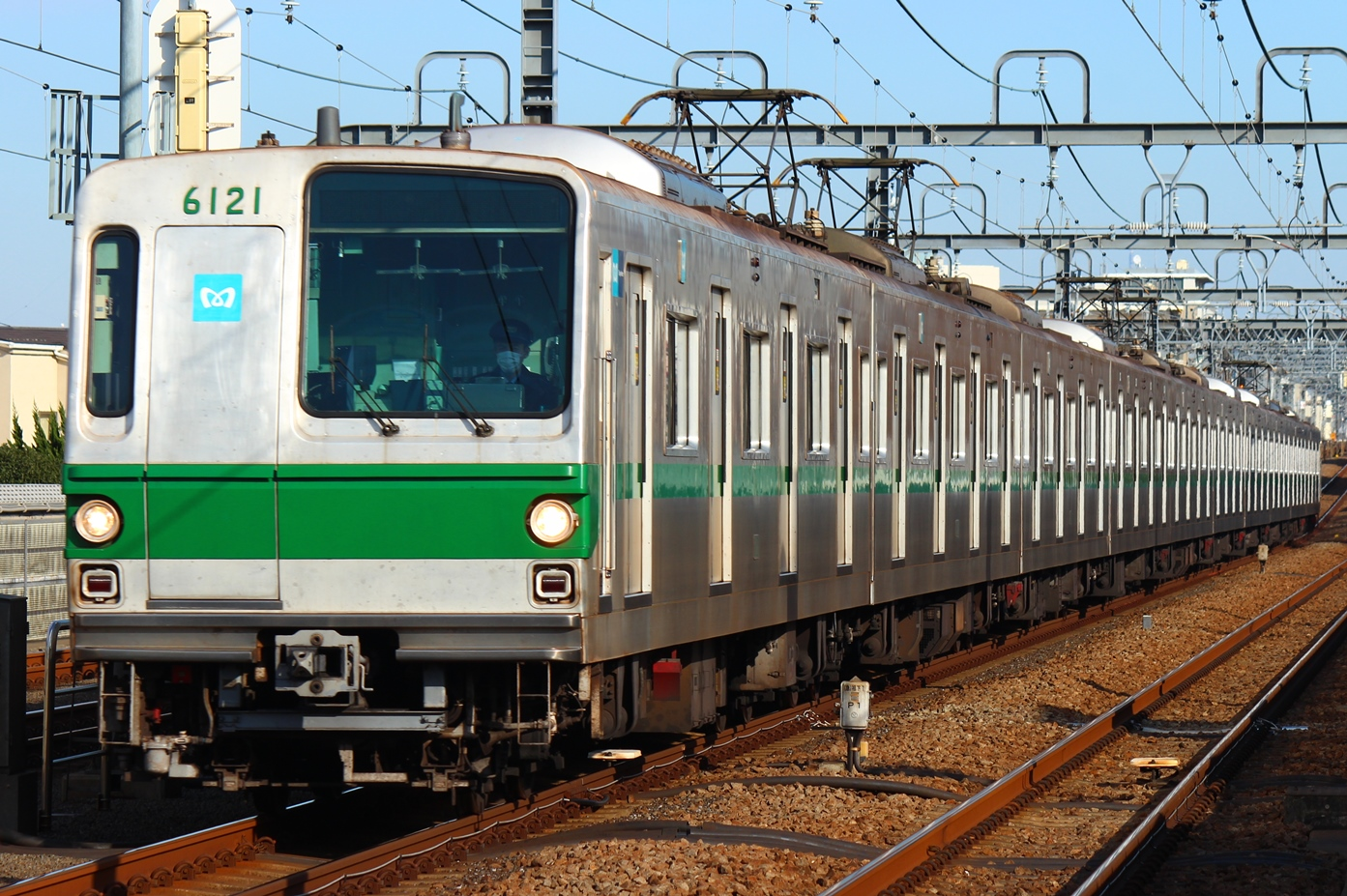 東京メトロ千代田線6000系